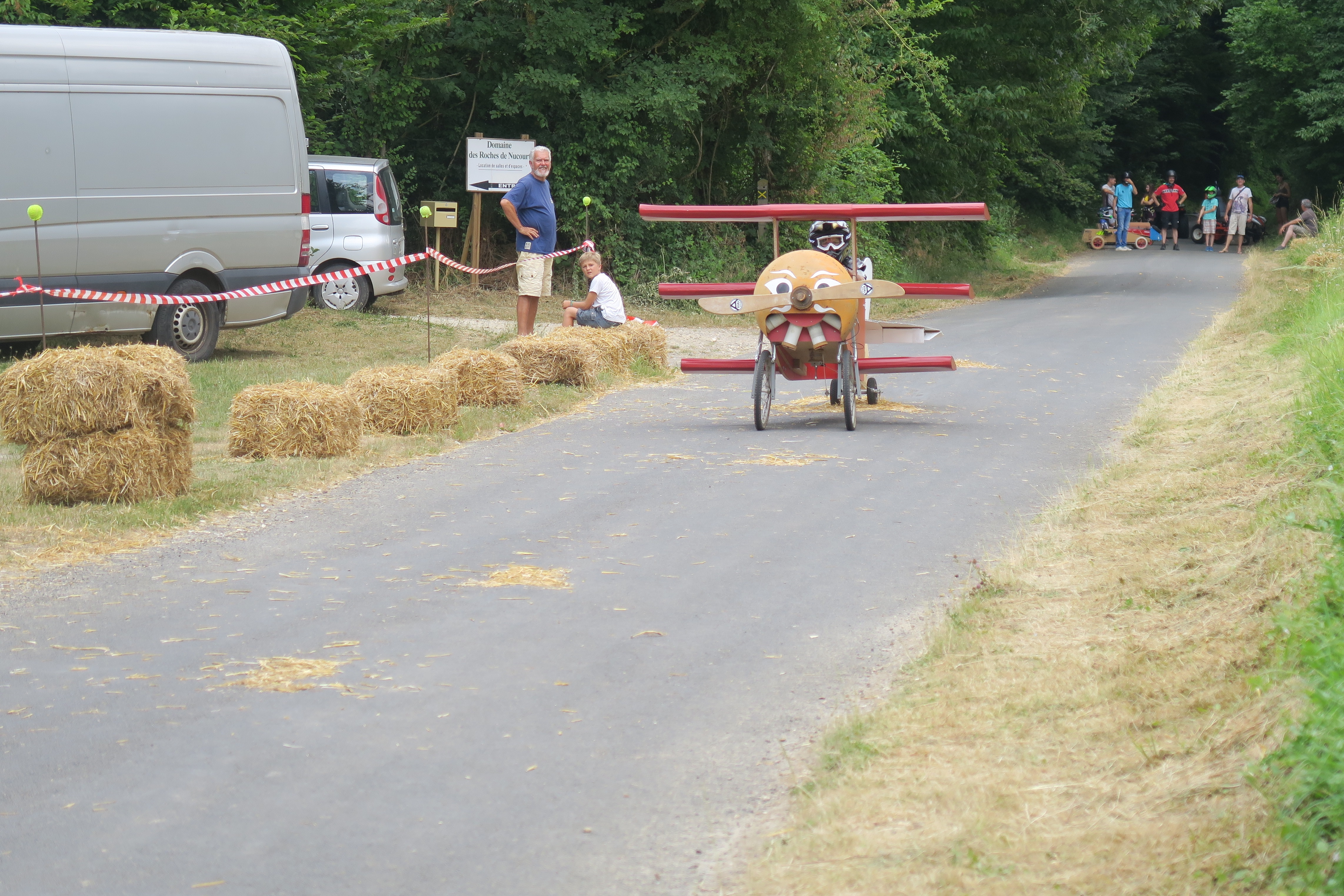 Caisse à savon à Nucourt en juillet 2019